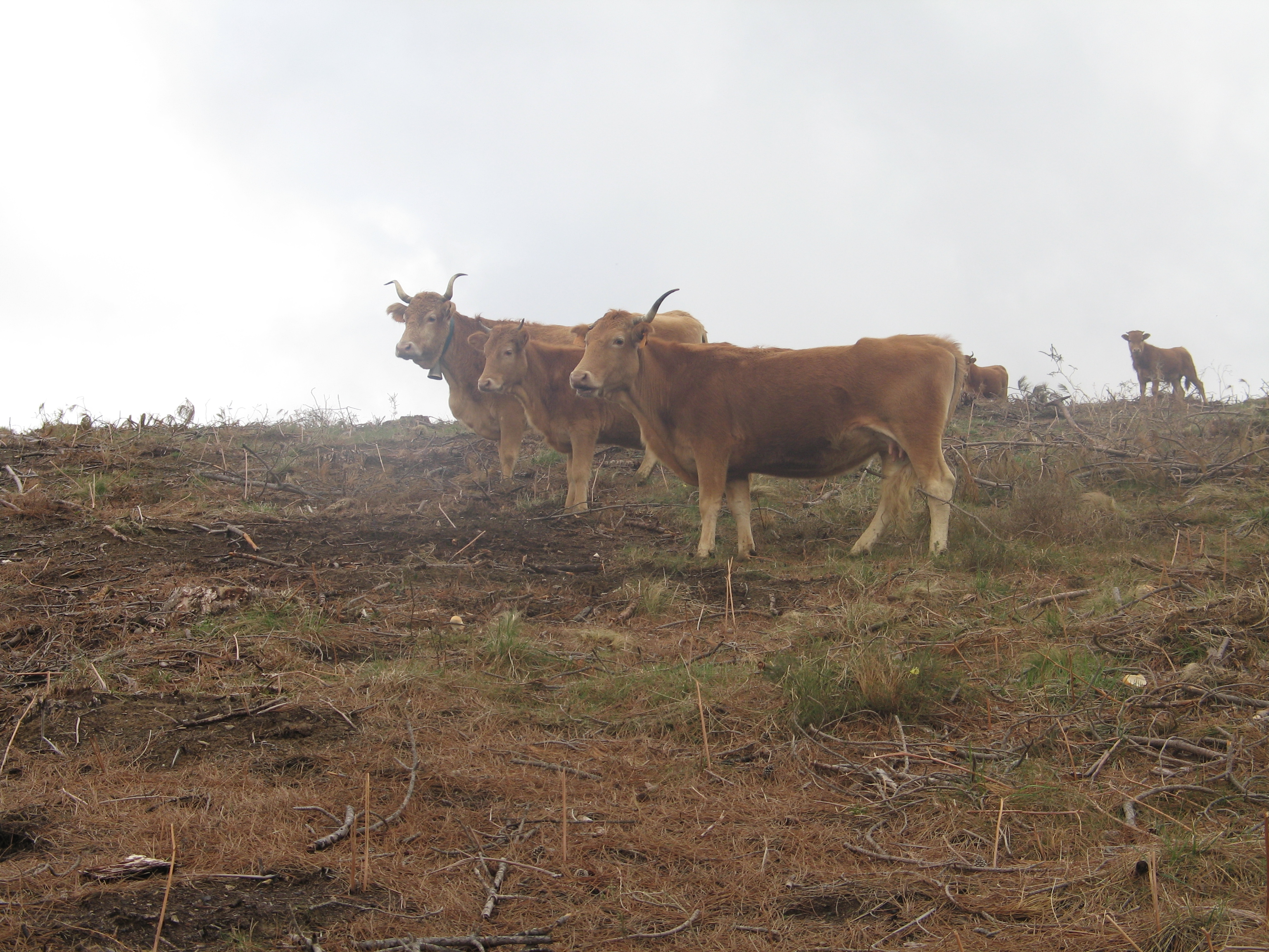 Betizuen talde bat Elgeako mendilerroan, larre eskasarekin.